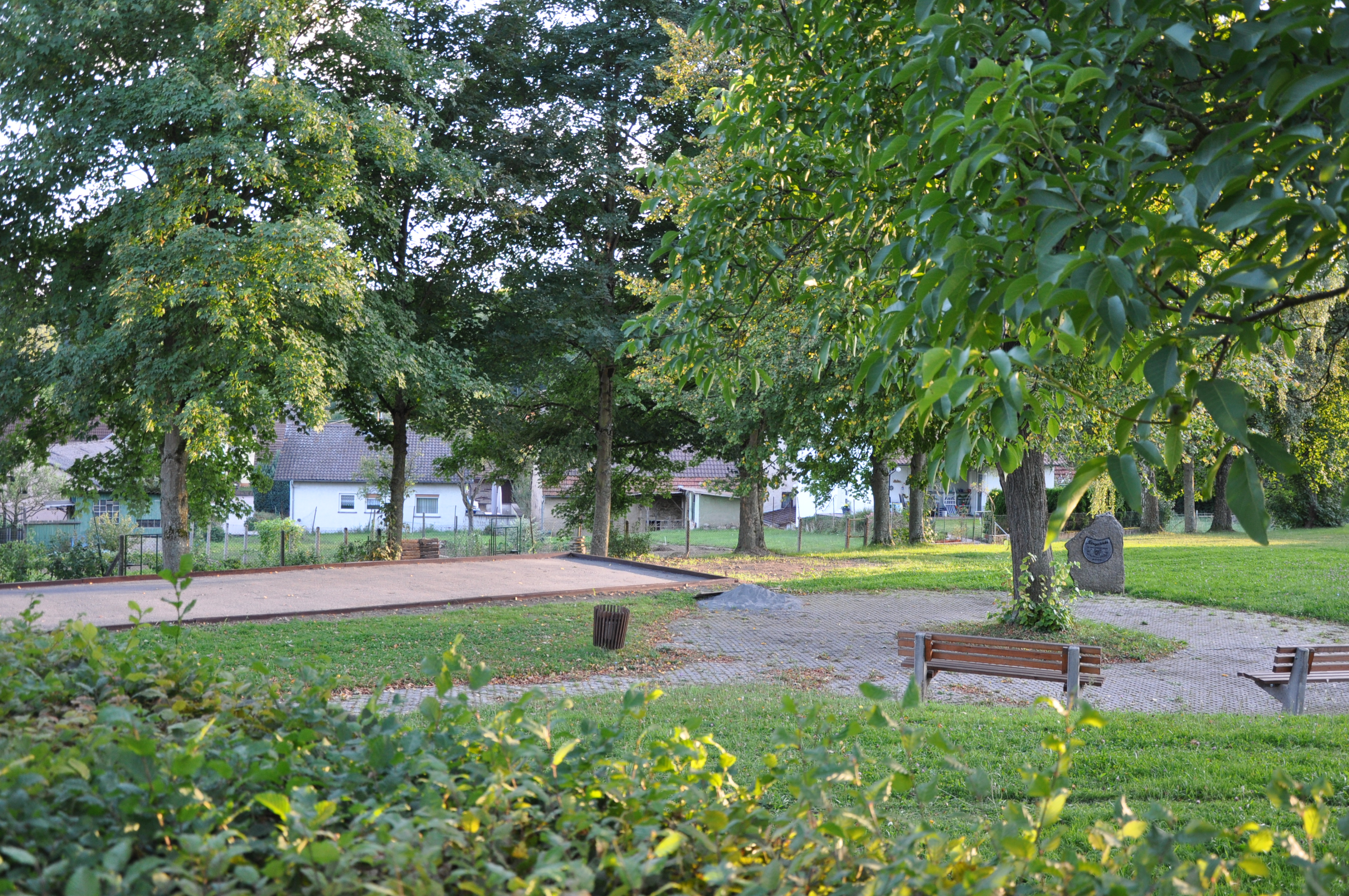 Öffentlicher Bouleplatz auf dem Sängerlindenplatz in Bargen zwischen Haupt- und Schulstraße.